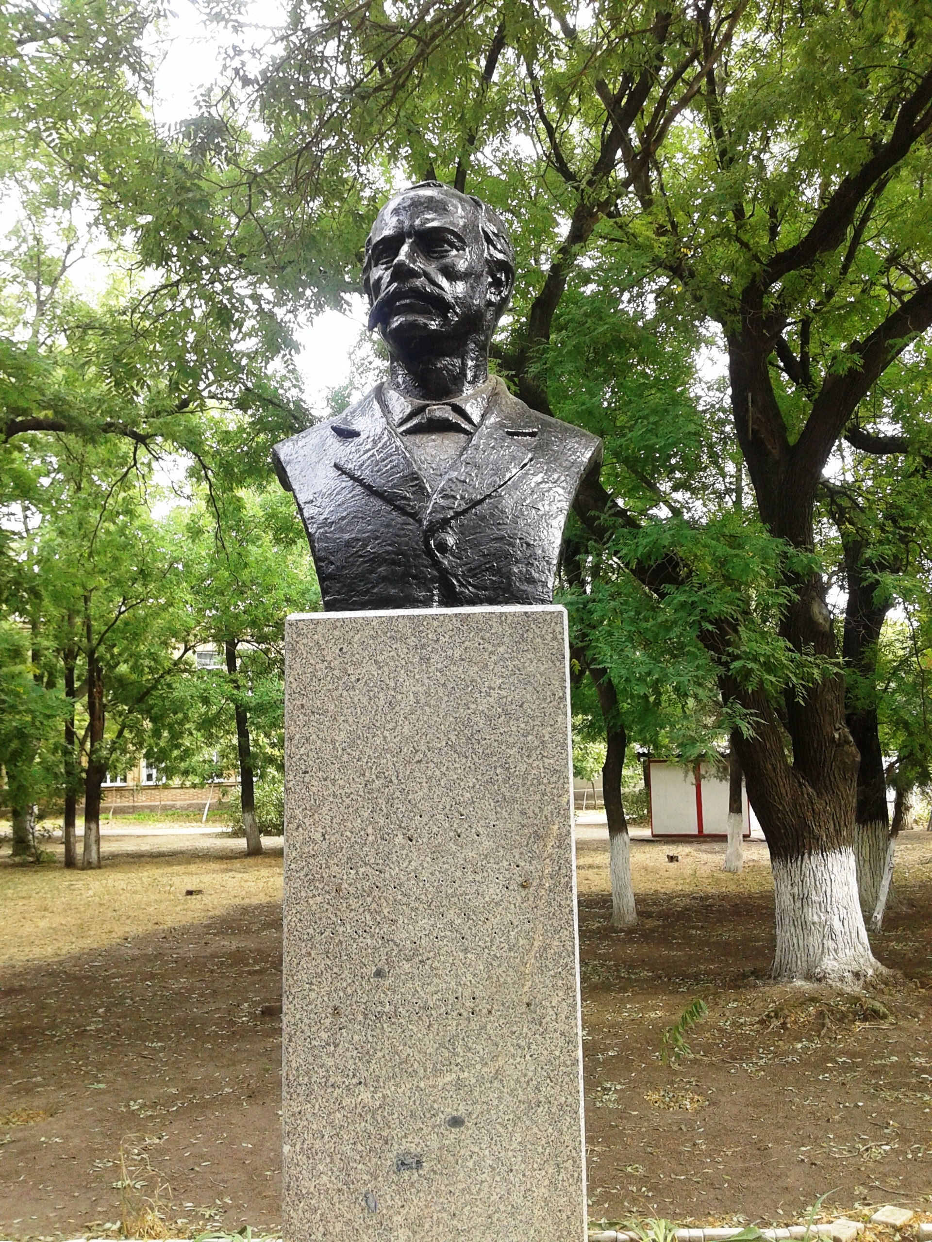 Бюст Георгію Раковському біля будівлі гімназії в сквері на площі 28 червня, Болград, Одеська область, Україна